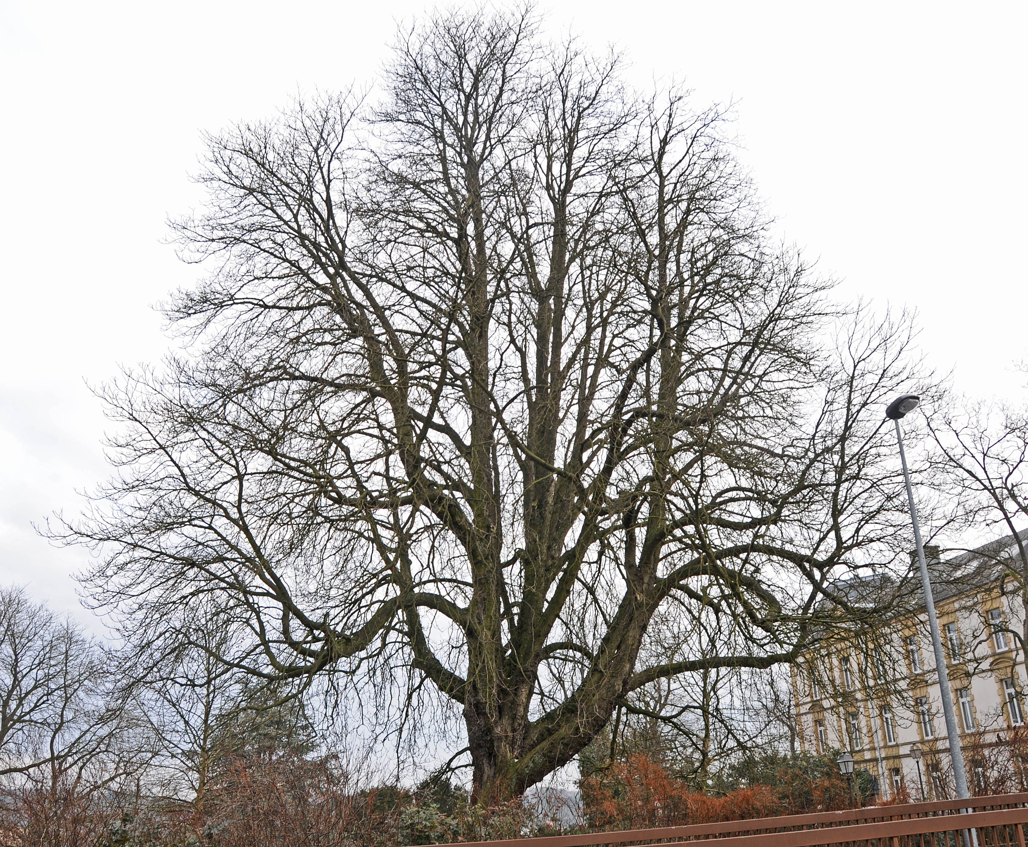 Käschtebam um Square Brasseur, Stad